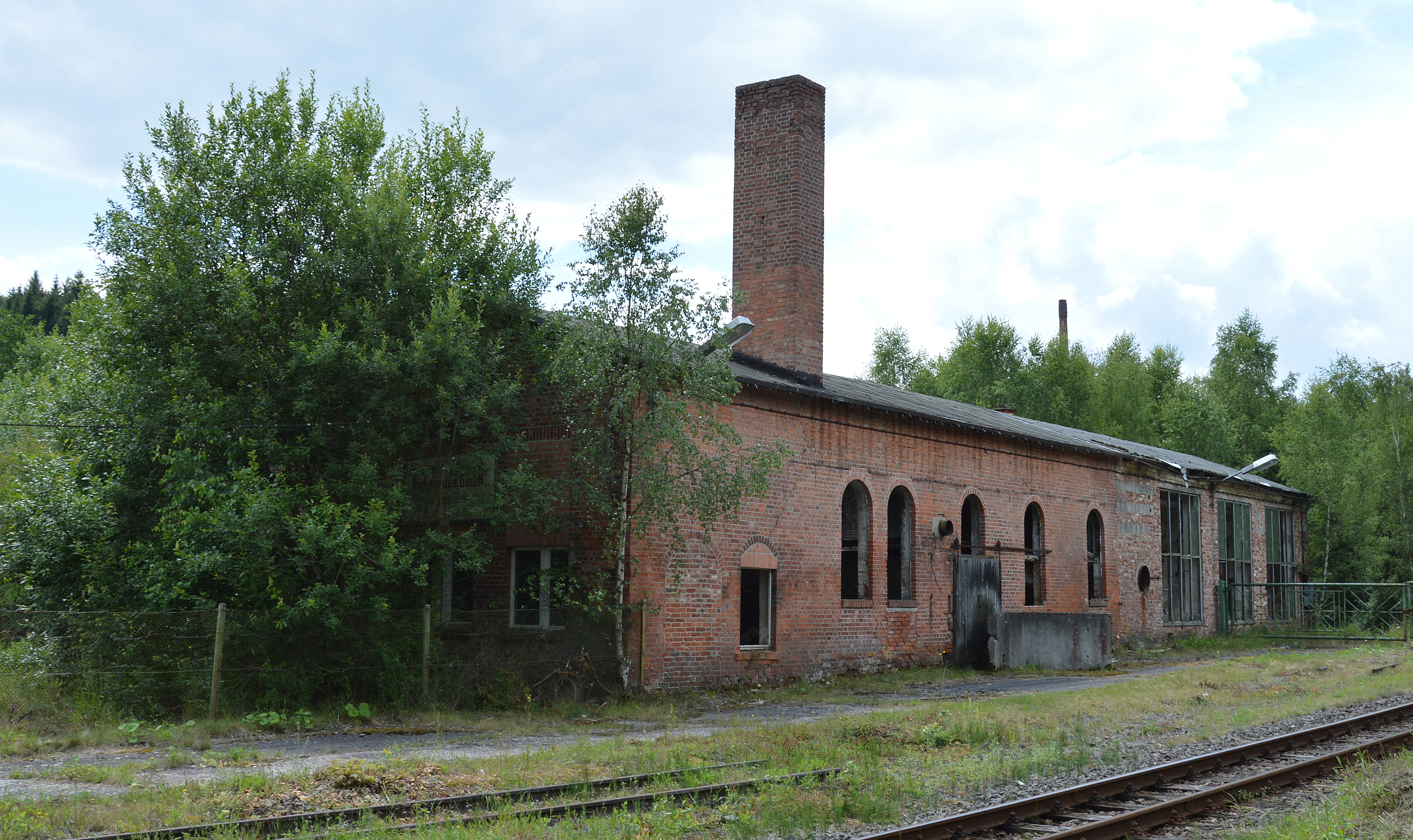 Rinkemühle